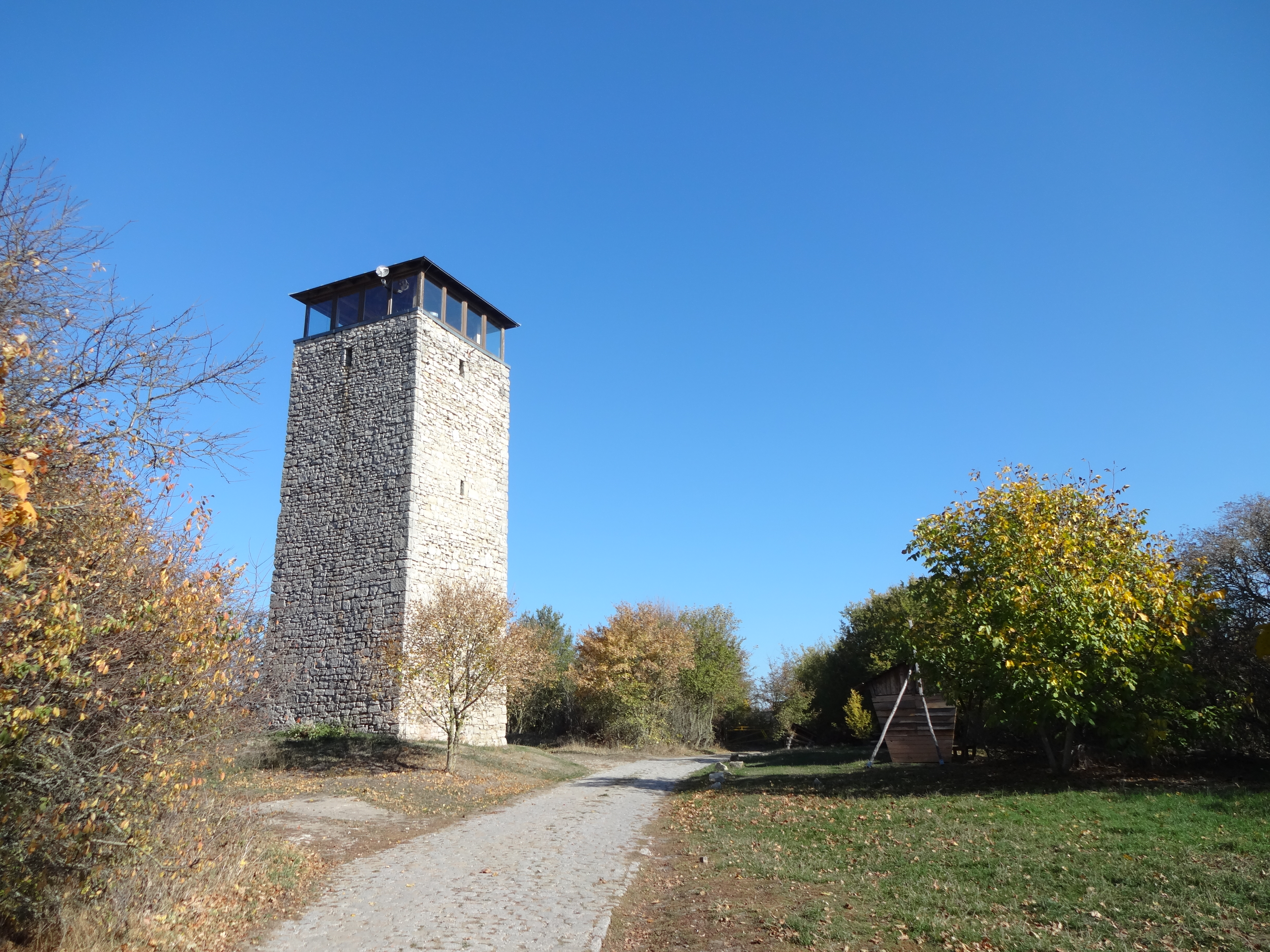 denkmalgeschützte Heiketalwarte bei Zilly in Sachsen-Anhalt